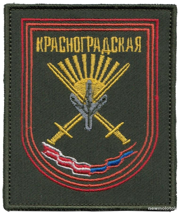 Нарукавная эмблема 57-й отдельной гвардейской мотострелковой бригады.